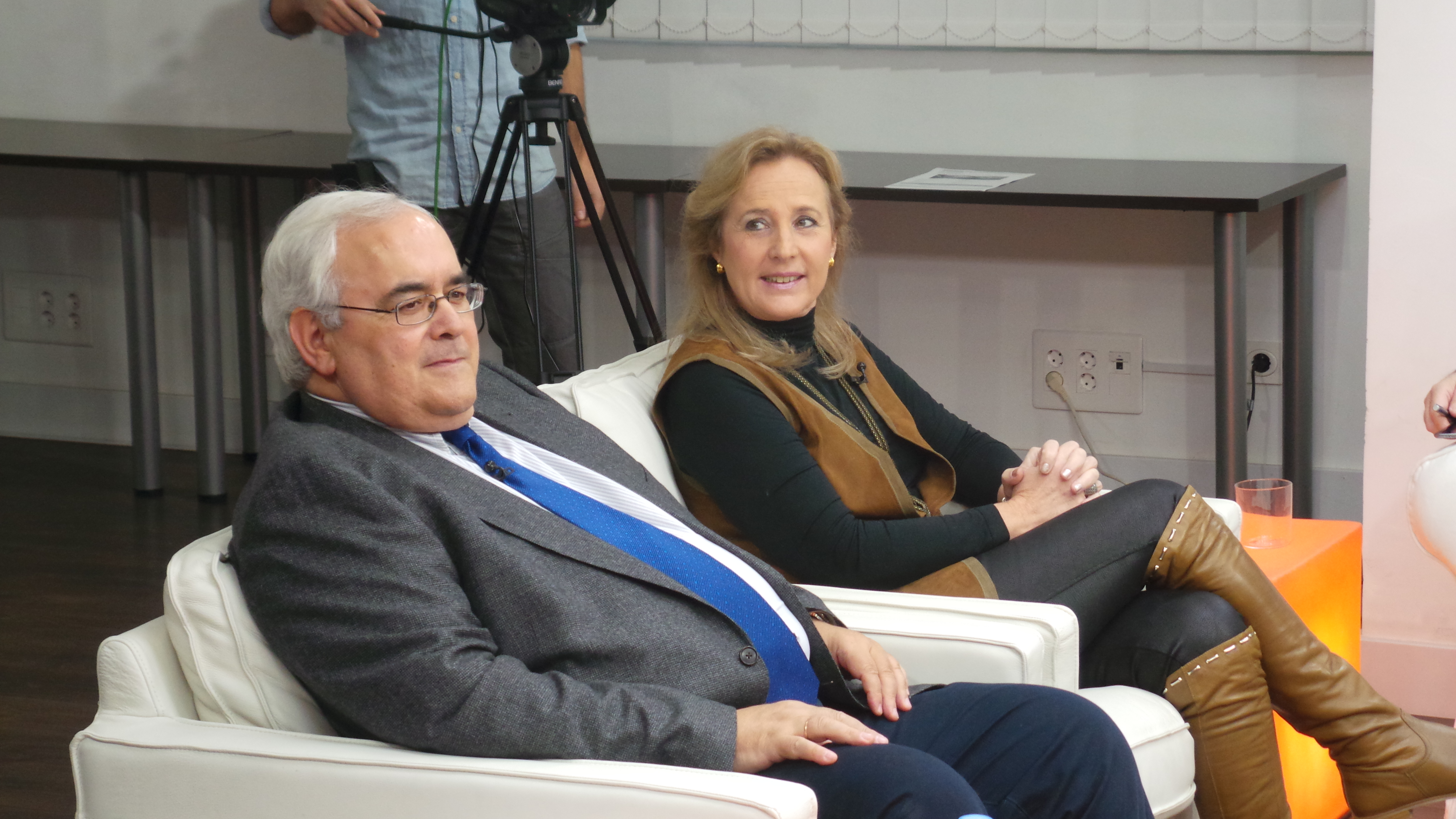 Mikel Buesa y Lourdes Méndez